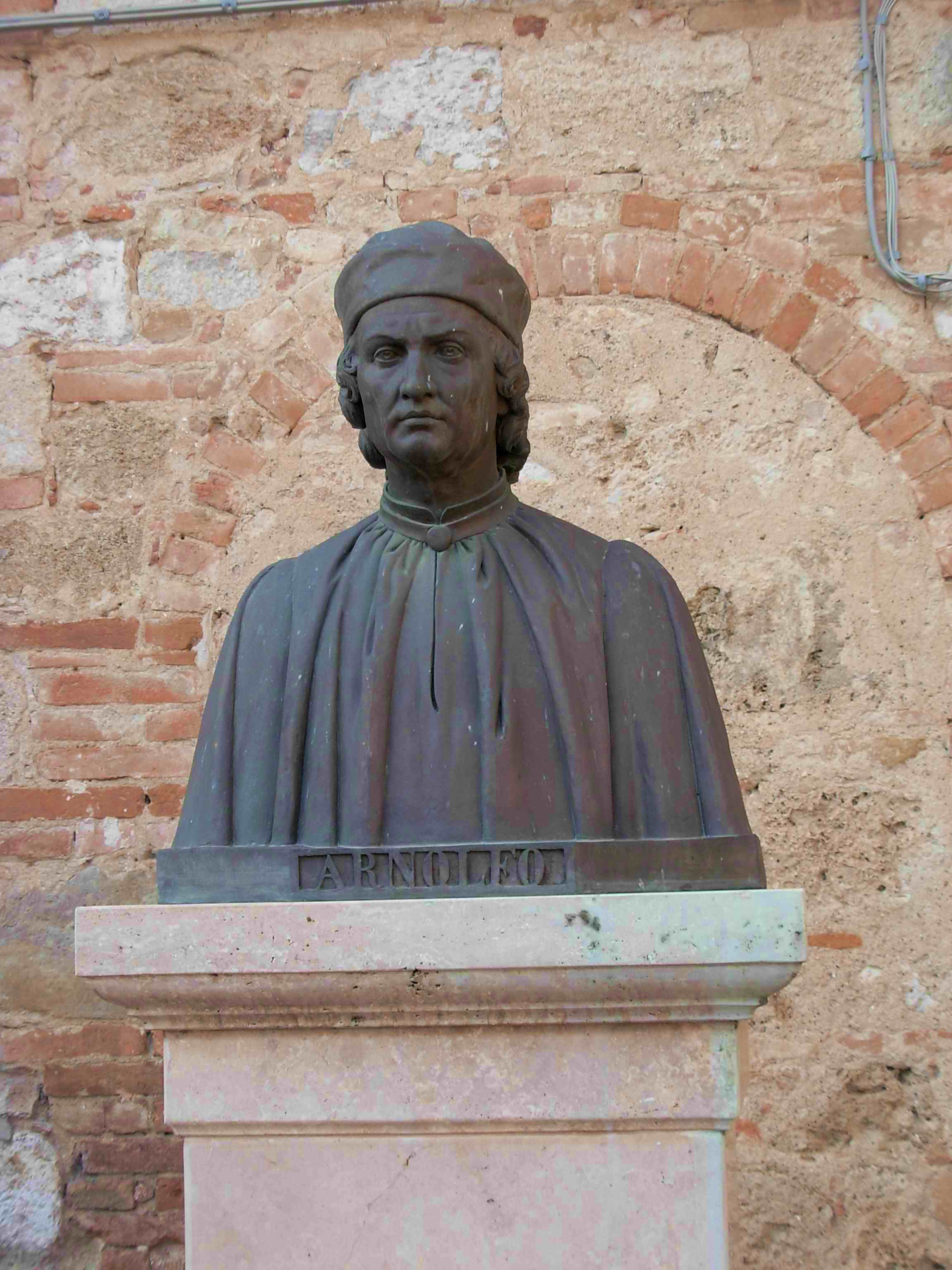 Colle di Val d'Elsa (Italia): il Busto di Arnolfo di Cambio in Piazza Canonica